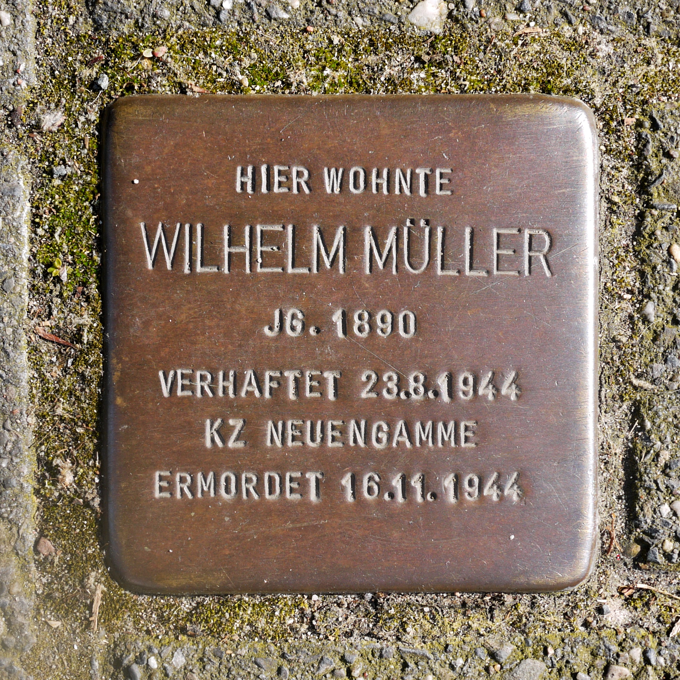 Stolperstein für Wilhelm Müller, vor dem Haus Dümptener Straße 17, Mülheim an der Ruhr (Info-Seite der Stadt MH)